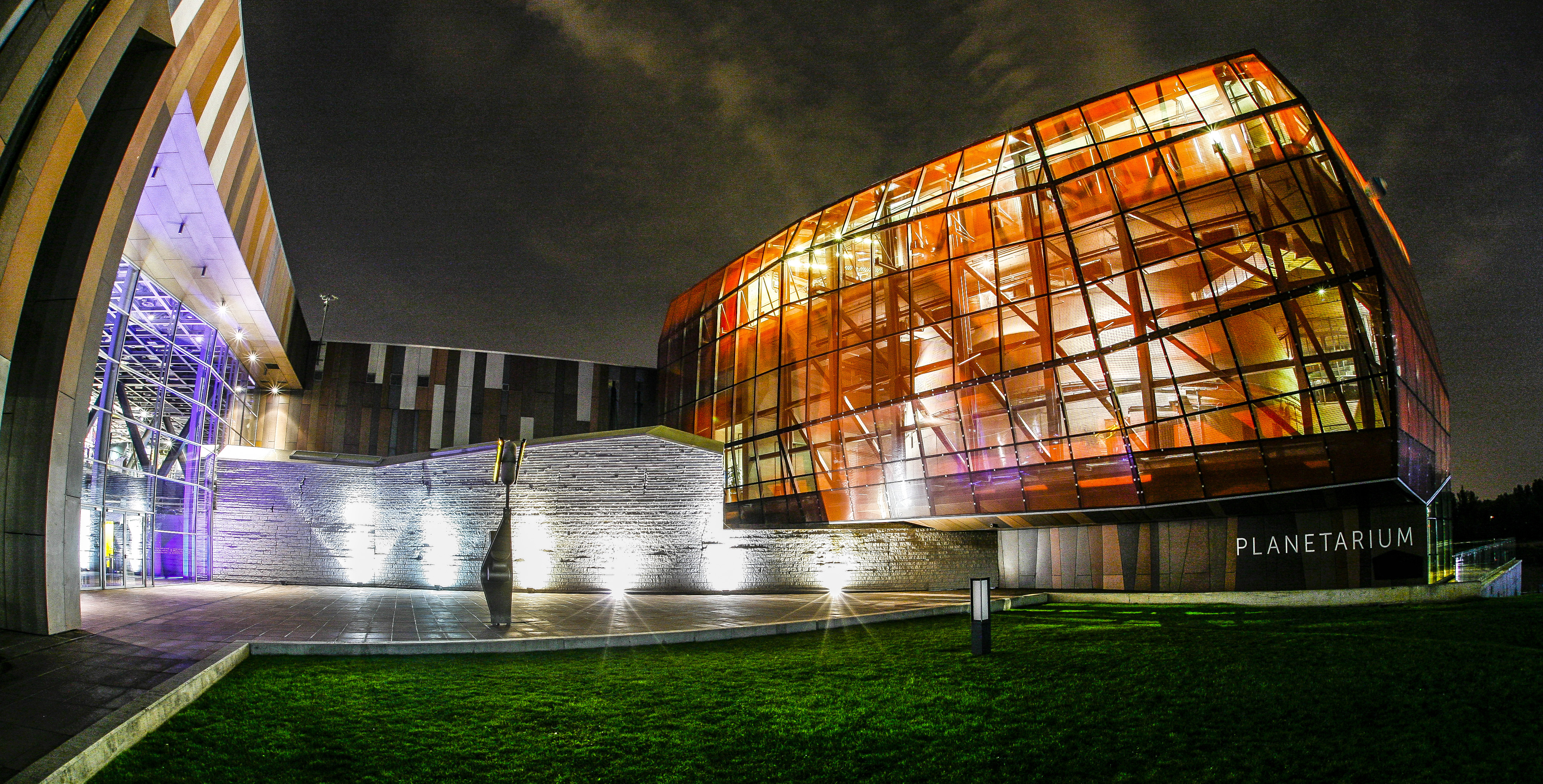 Planetarium Niebo Kopernika - Centrum Nauki Kopernik w Warszawie, fot. W.Surdziel. Archiwum CNK, współpraca ze Stowarzyszeniem Wikimedia Polska, wikiprojekt.